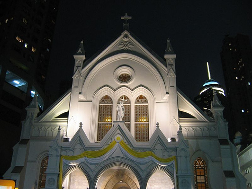 位於香港中環堅道的天主教座堂